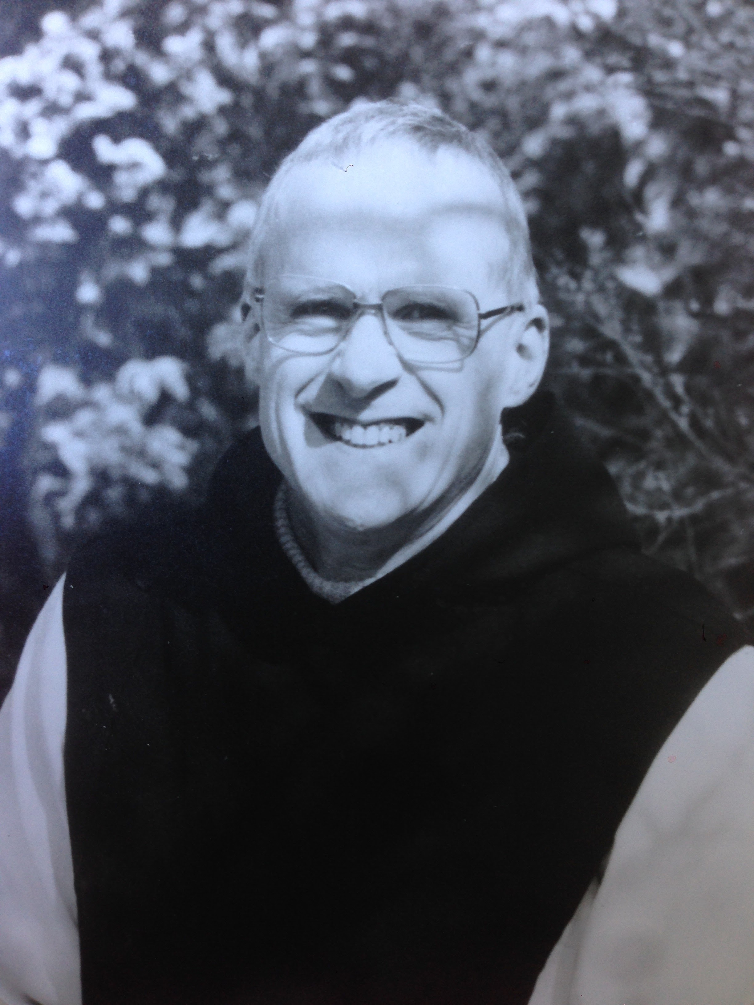 Portrait d'André Louf dans les années 1970